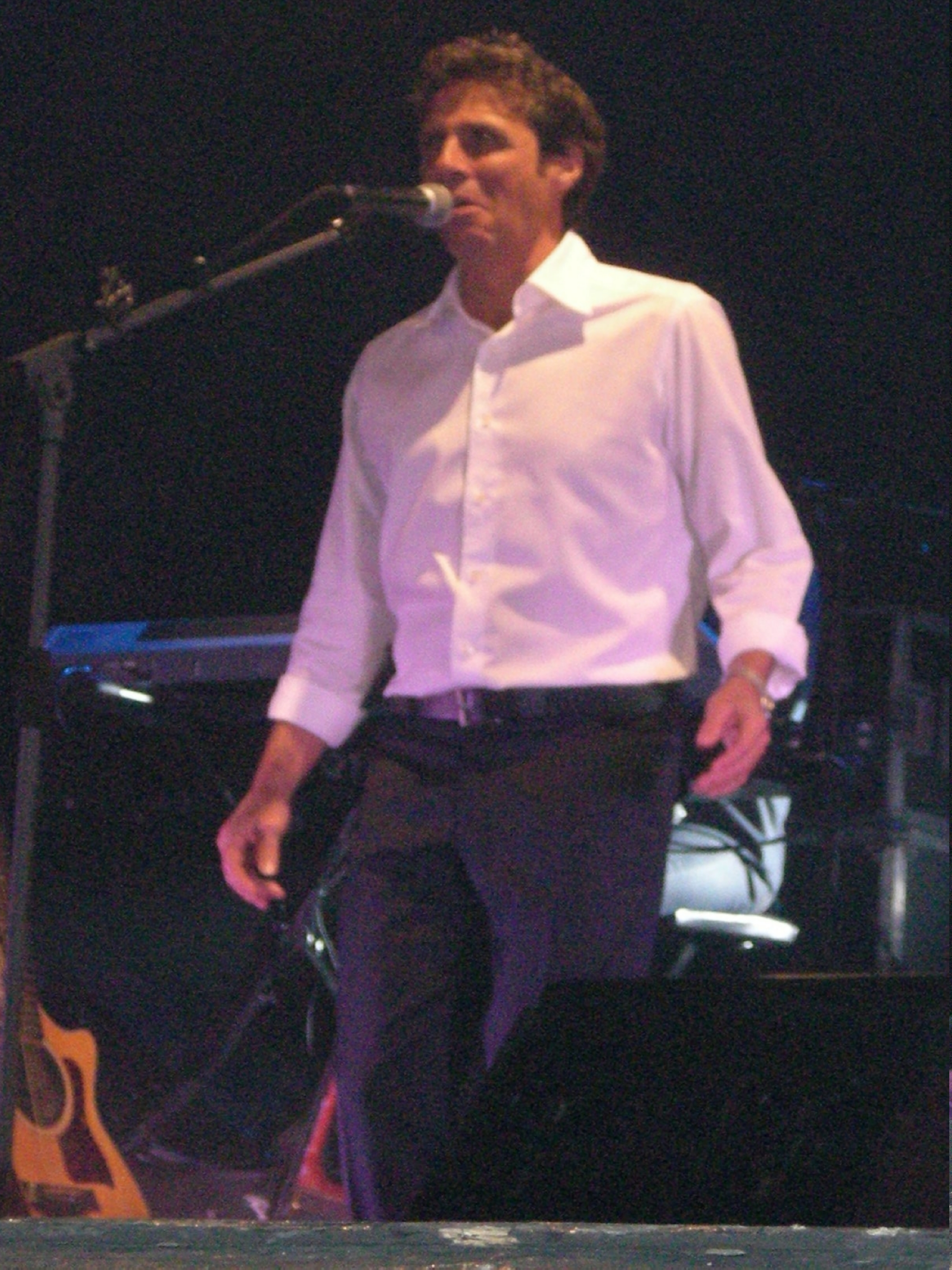 Luca Barbarossa in concerto al Teatro Colosseo di Torino, 1 dicembre 2009 - Foto di Vito Vita